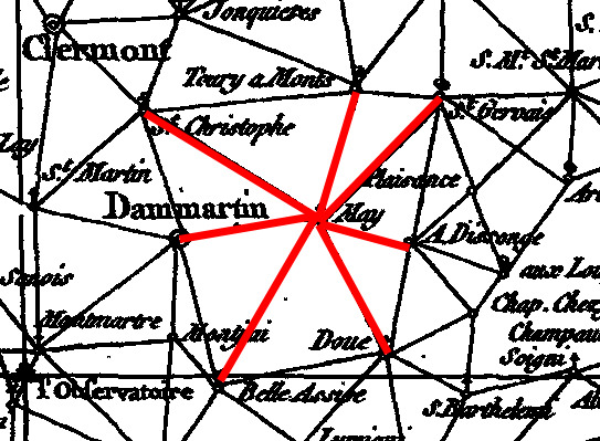 Cassini de Thury, triangulation autour de May